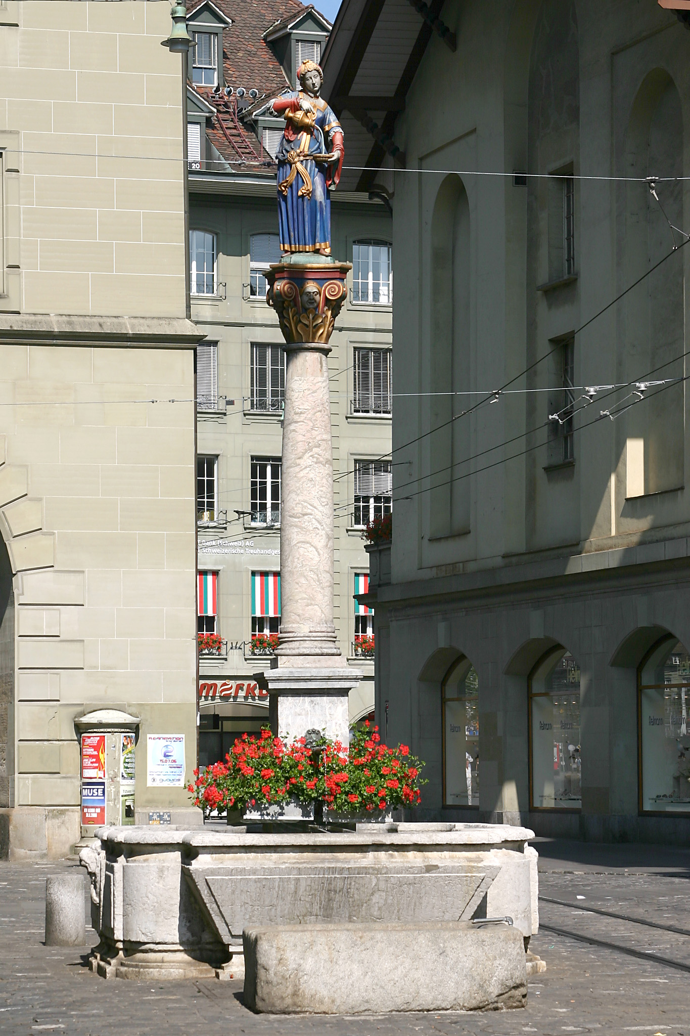 Anna-Seiler-Brunnen, Bern, Switzerland